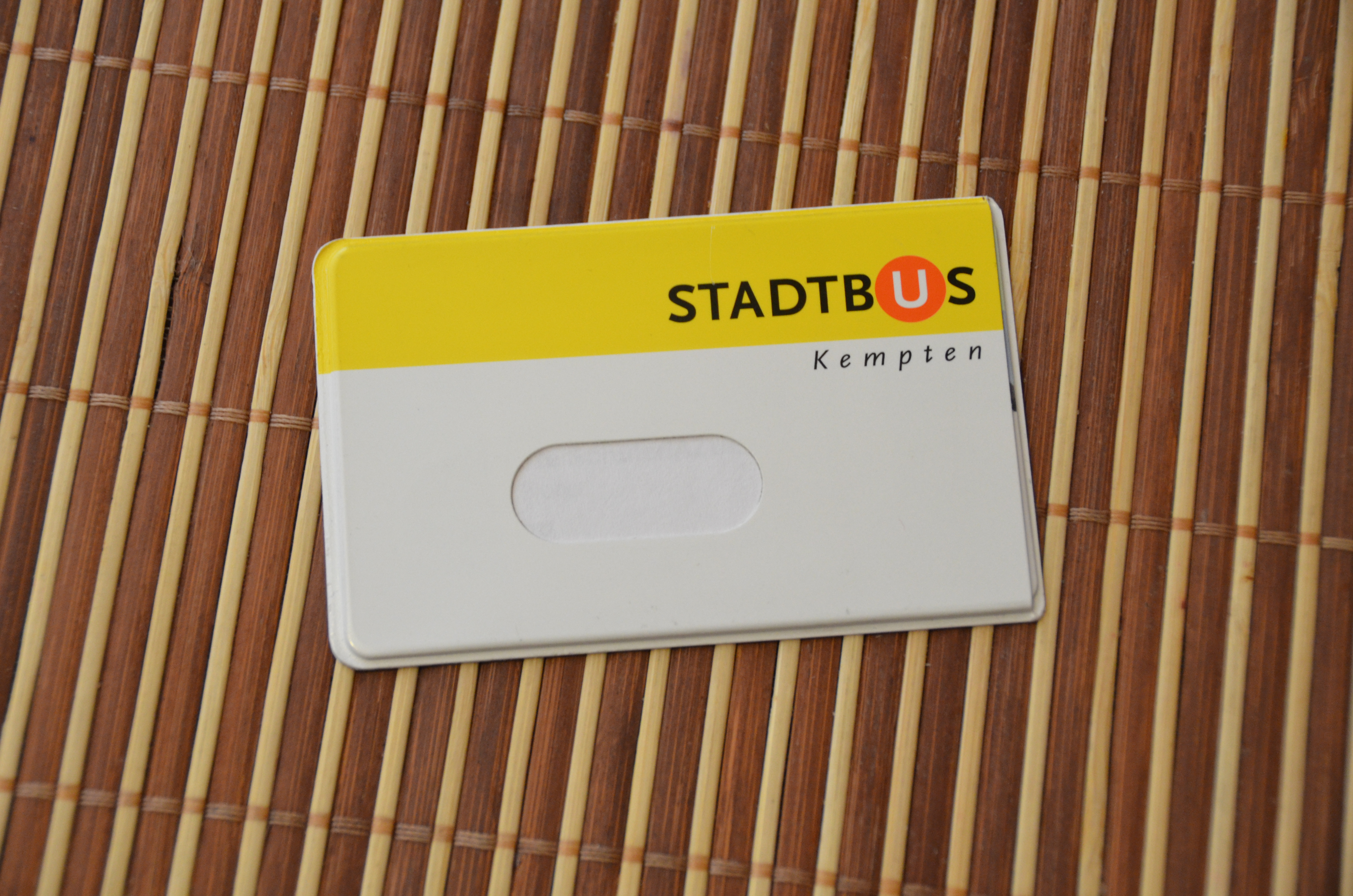 Karte der Verkehrsgemeinschaft Kempten - Stadtbus Kempten